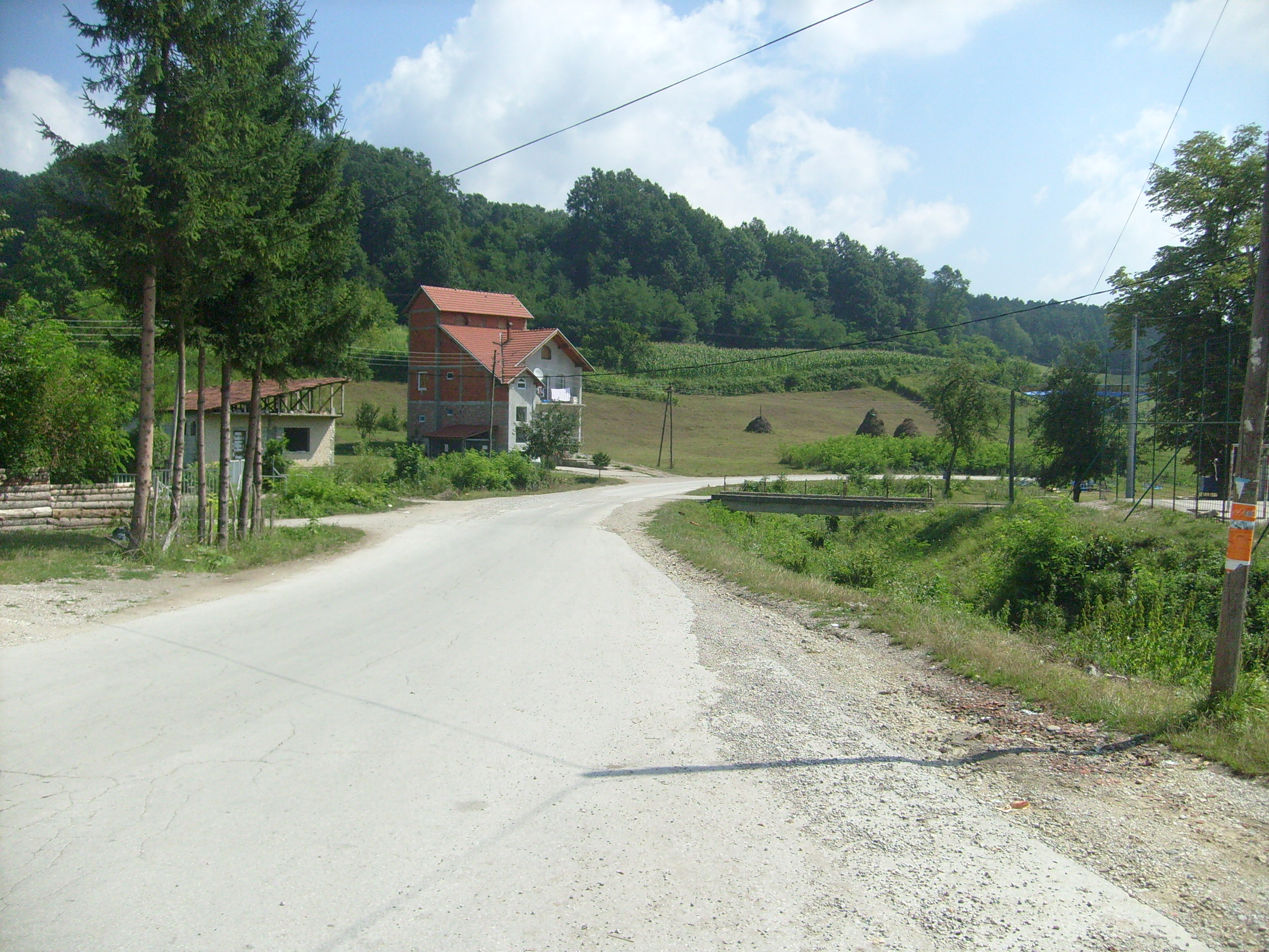 Križevići